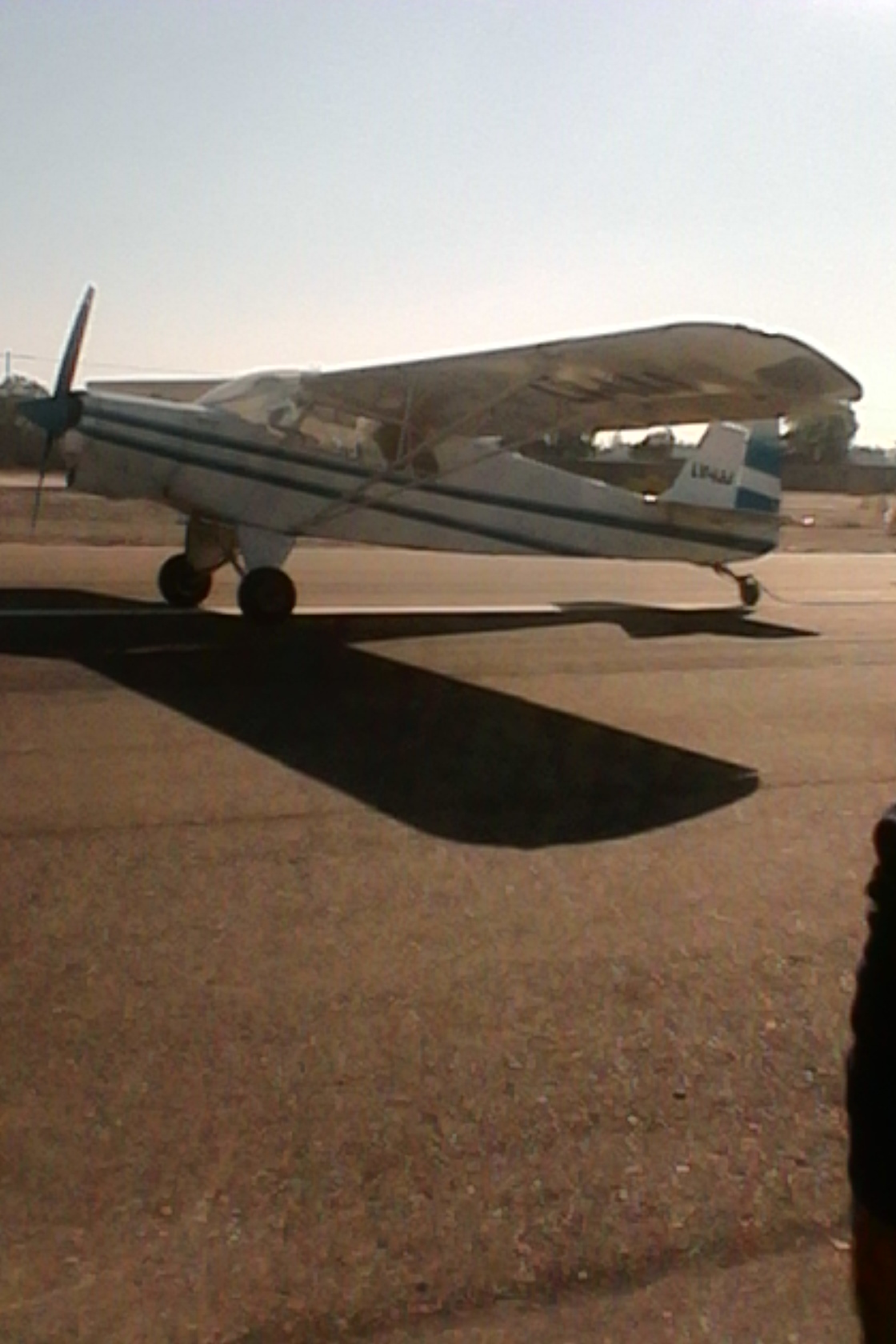 avión IA 46 Súper Ranquel para remolque de planeadores